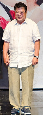 더 이상은 못 참아 제작발표회